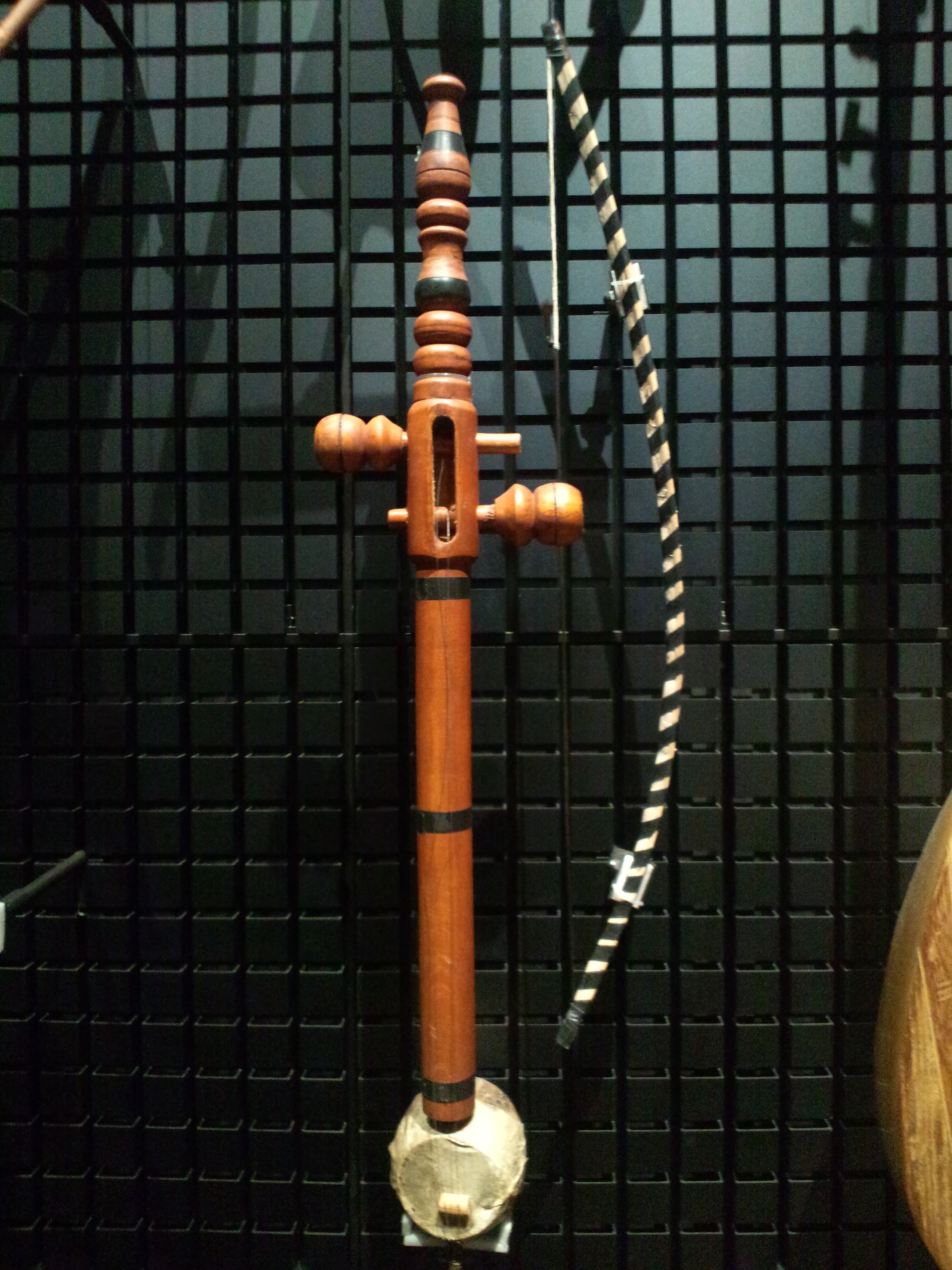 国立民族学博物館（大阪） ラバーブ（エジプト、カイロ、1990年代制作）